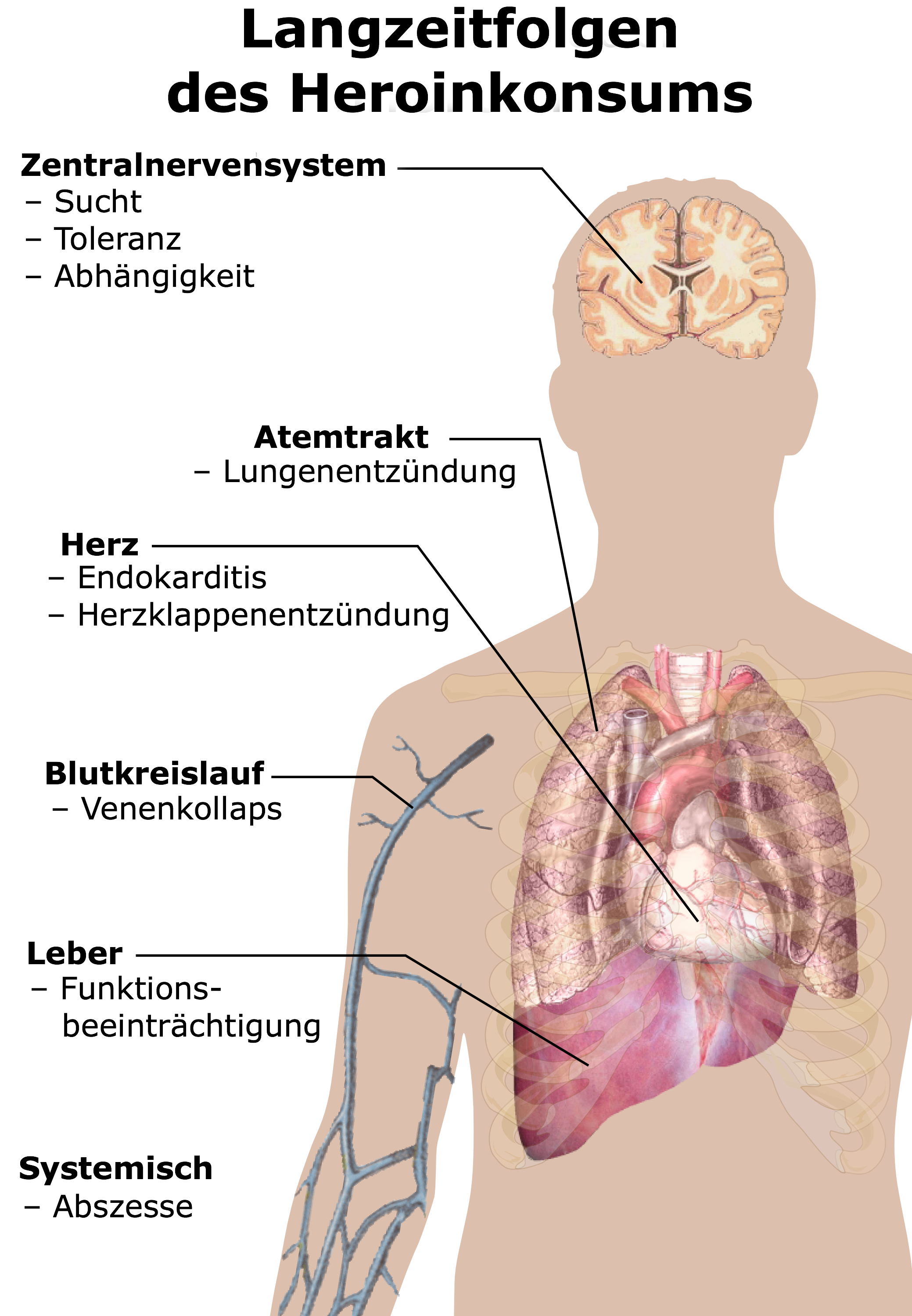 Langzeitfolgen des Heroinkonsums.